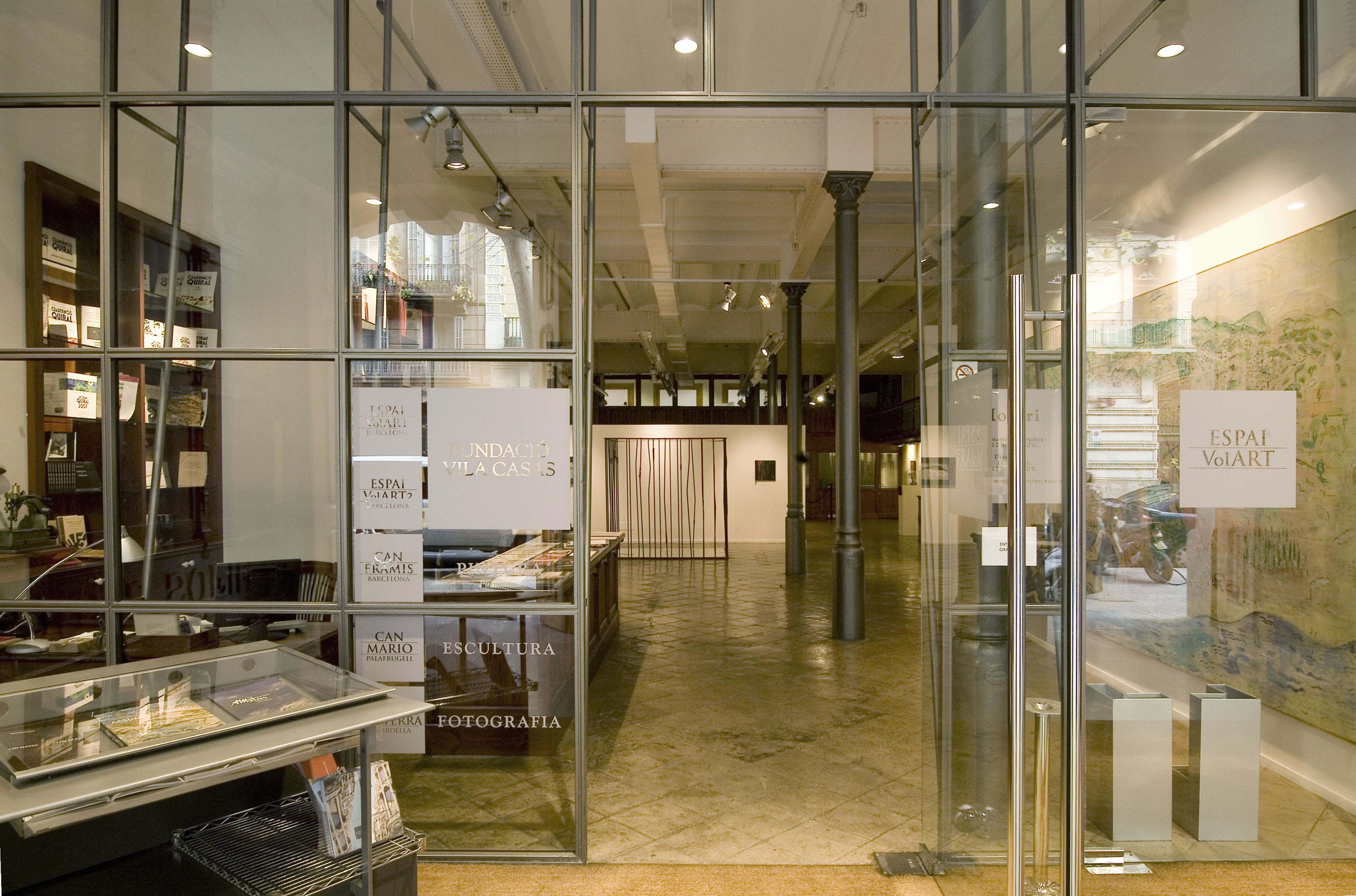 El Espai Volart 2 es un ámbito artístico donde normalmente se organizan exposiciones temporales de artistas con un trayectoria destacable, en Barcelona.